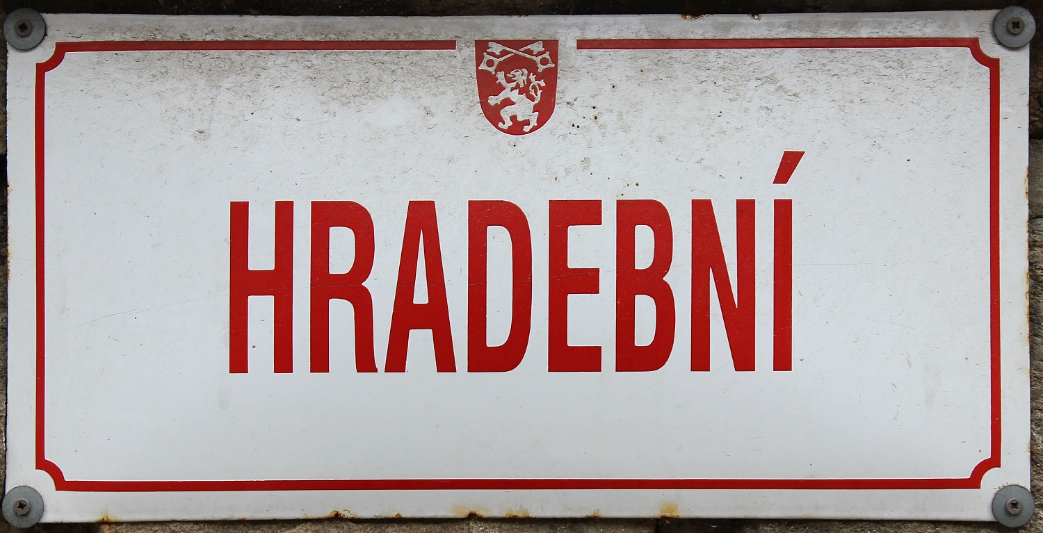 Prachatice